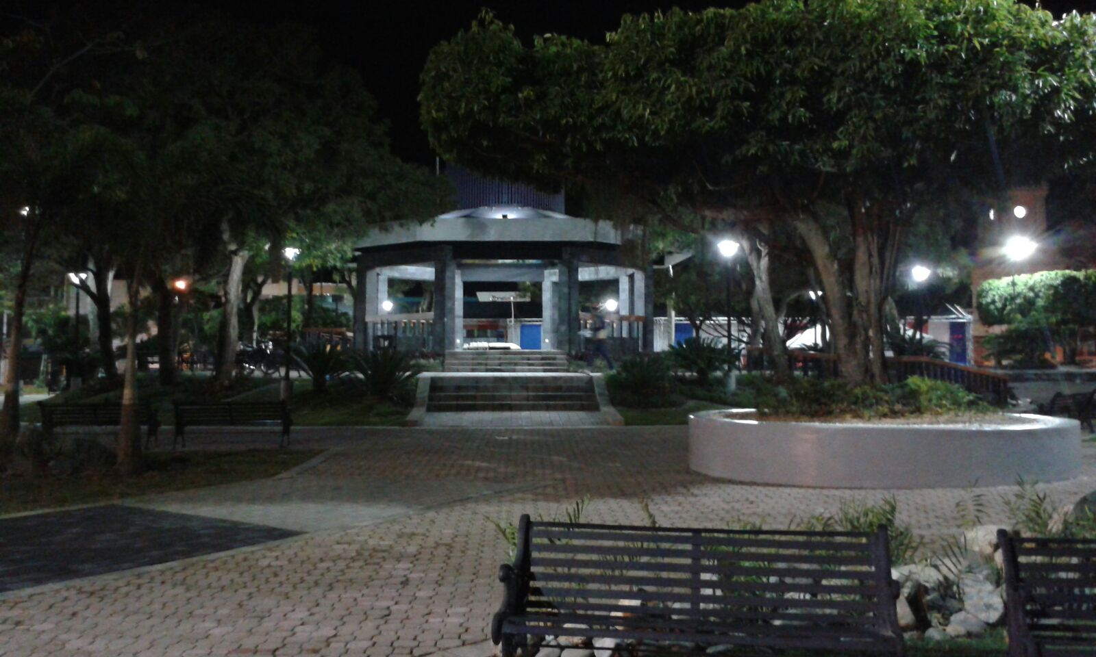 Parque Central de San Francisco de Macorís.